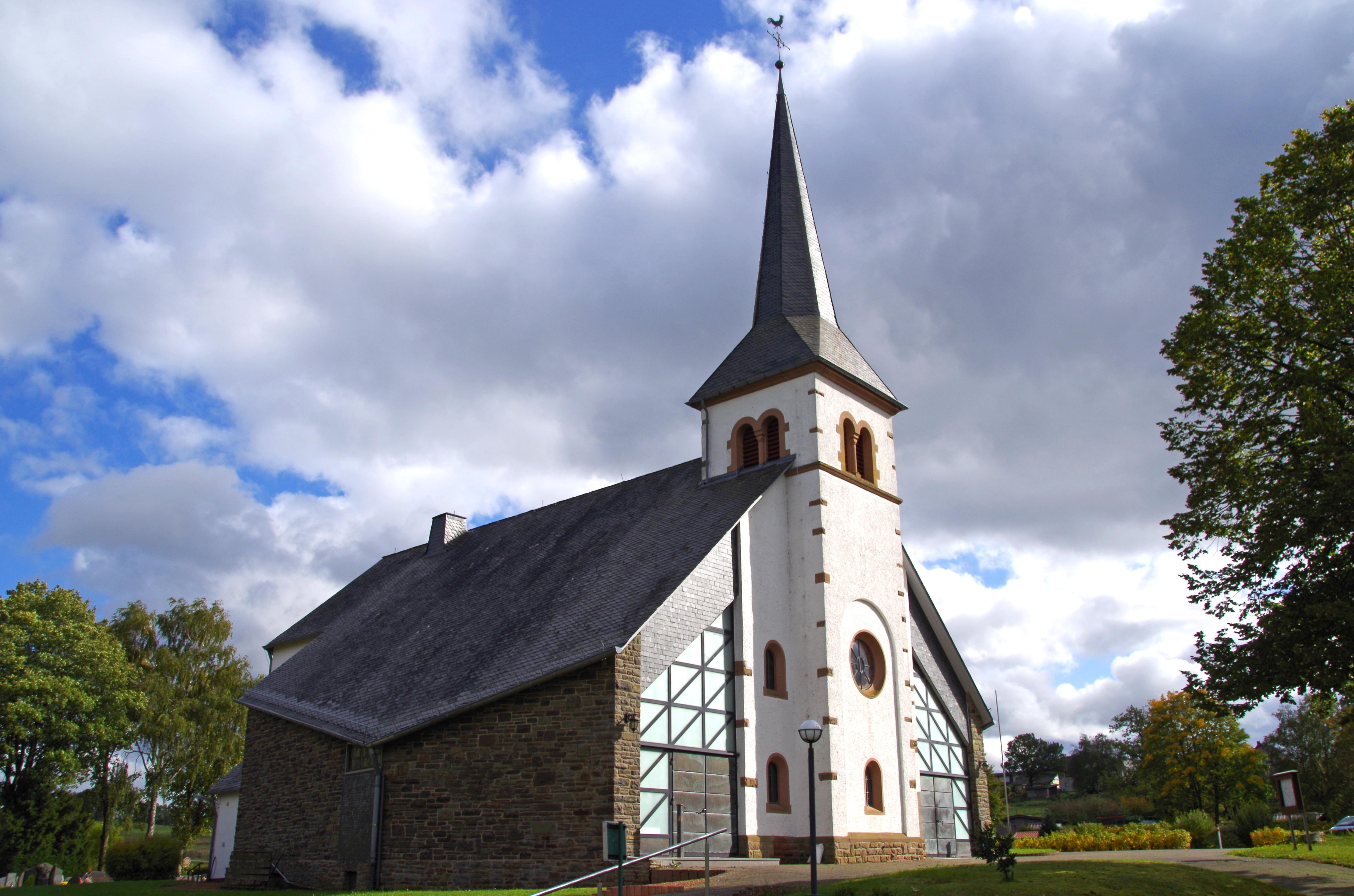 St. Antonius (Kreuzberg), Nordwestansicht